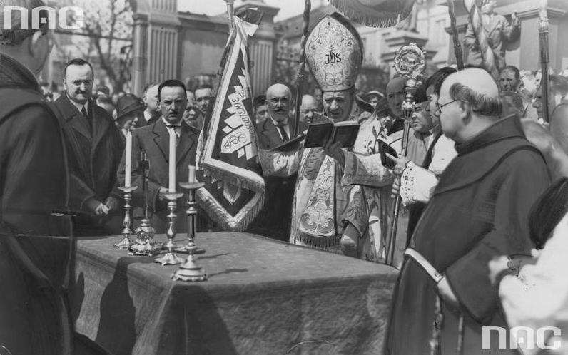 Poświęcenie sztandaru związkowego Kolejowego Przysposobienia Wojskowego w Piotrkowie Trybunalskim. Biskup łódzki Wincenty Tymieniecki w obecności wiceministra komunikacji inż. Józefa Gallota oraz starosty Strzemińskiego dokonuje poświęcenia sztandaru.